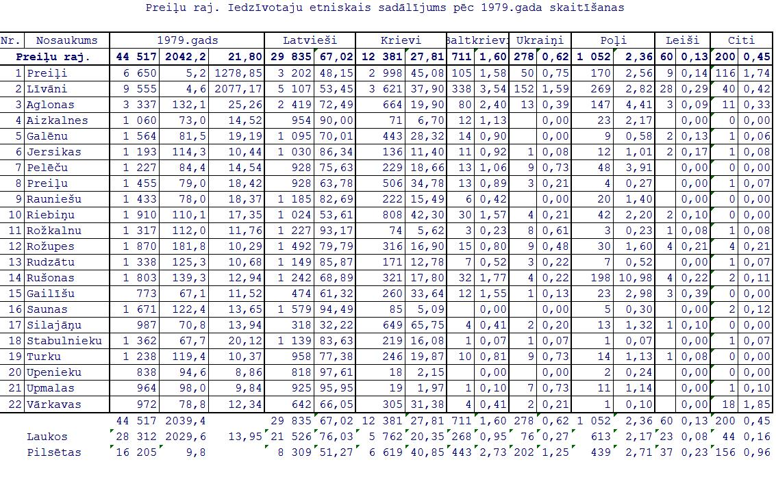 Latvijas 1979. gada tautas skaitīšanas dati